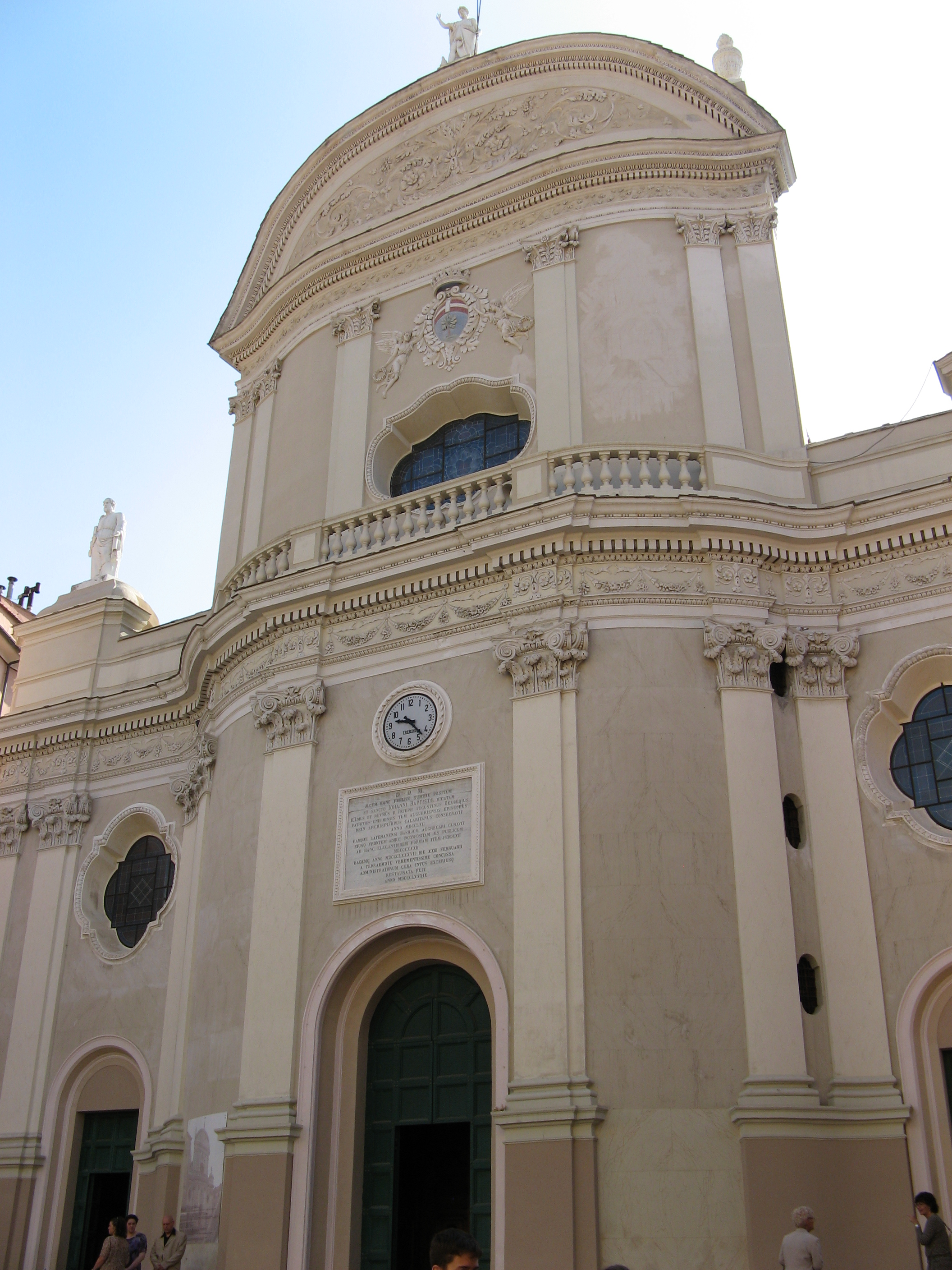 Chiesa di San Giovanni, Oneglia, Imperia, Italy